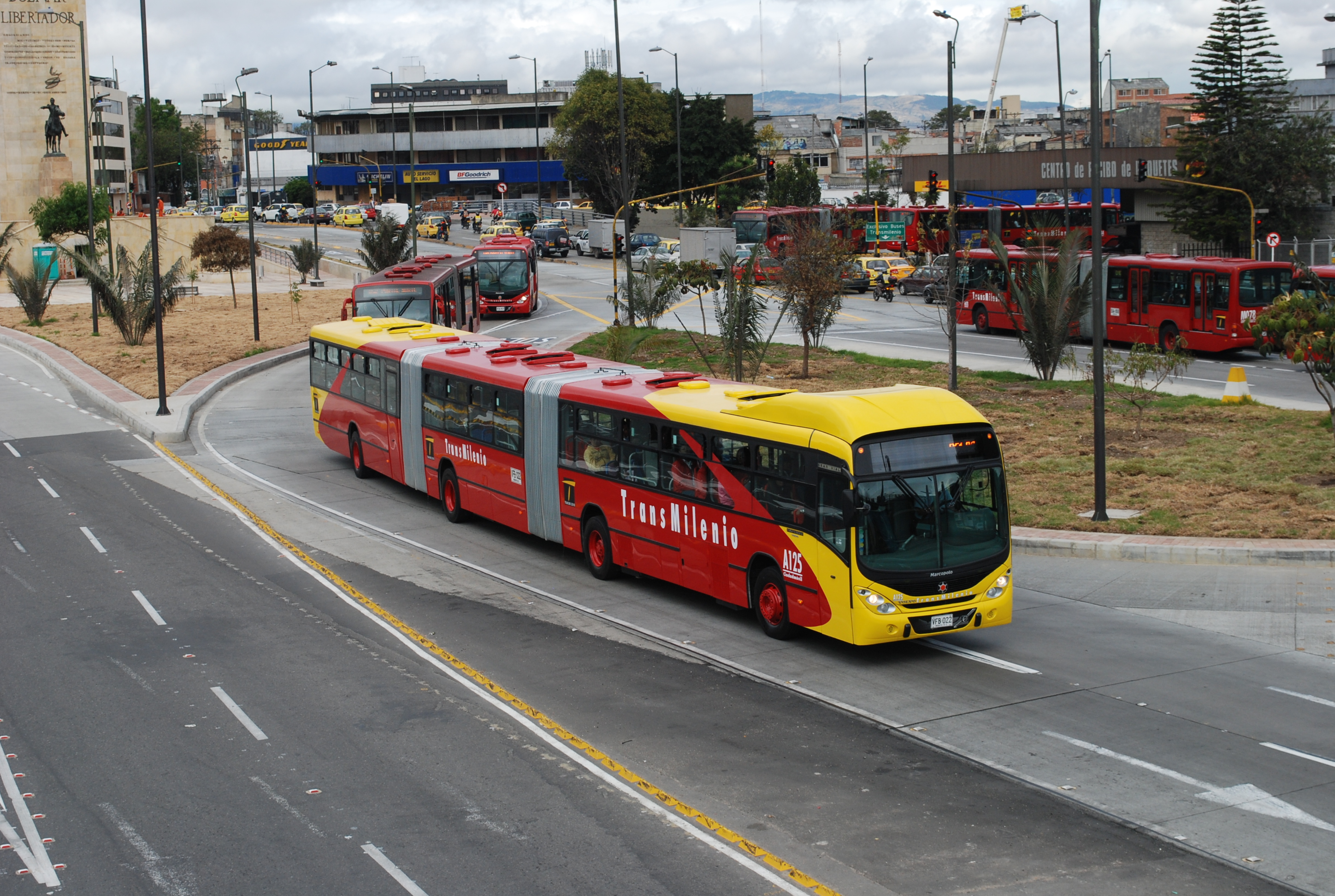 Biarticulado en TransMilenio